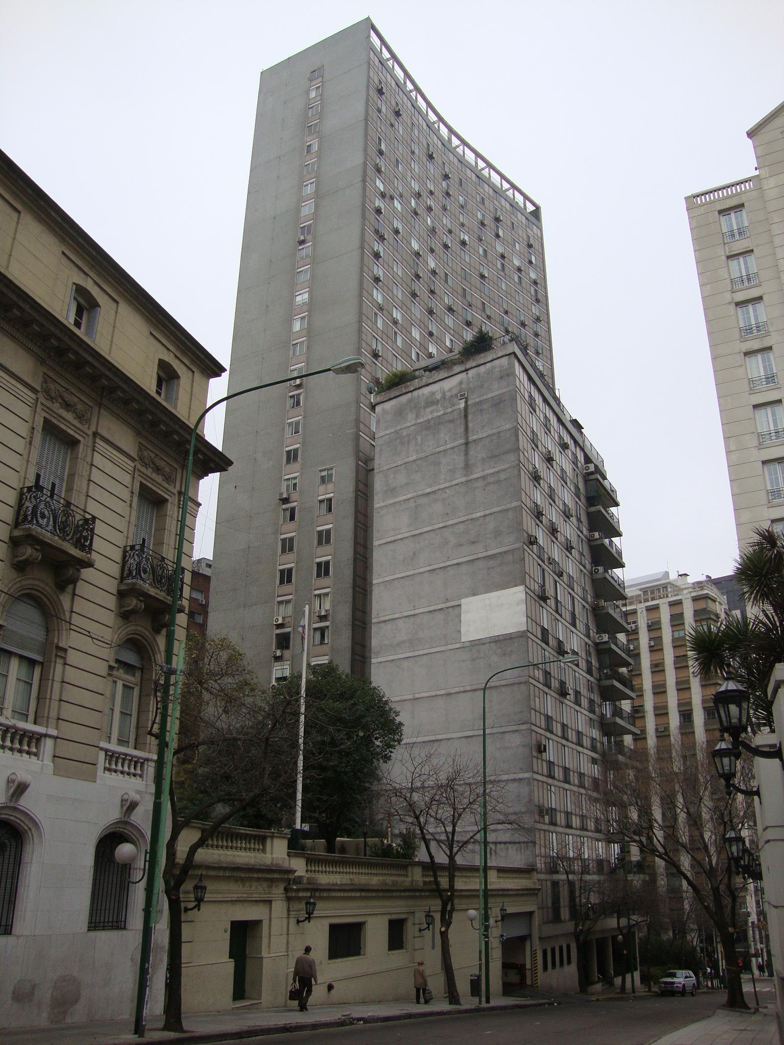 Edificio Sudamérica (año 1962), visto desde la calle Cerrito hacia el norte. Arquitecto: Arturo Dubourg. Buenos Aires, Argentina.